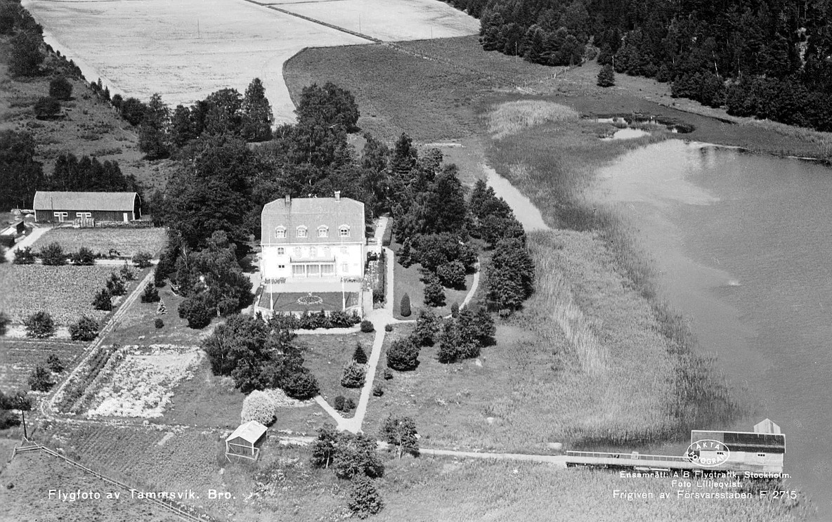 Flygfoto över Tammsvik, Bro socken, Uppland 1938